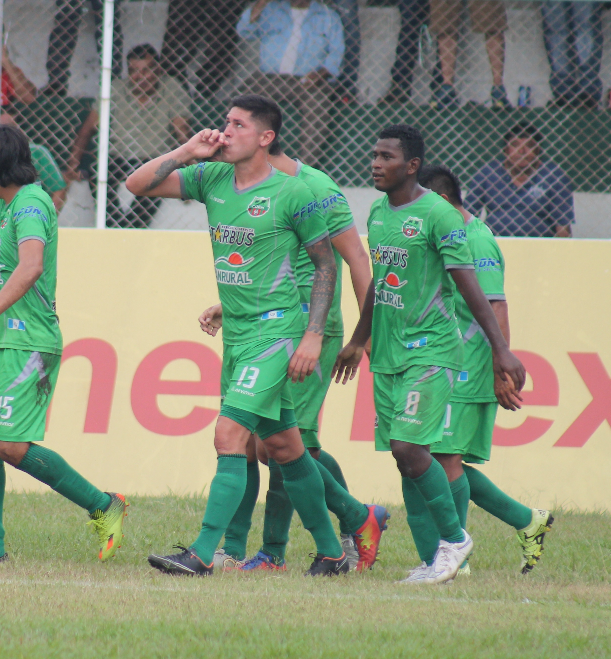 Paulo Centurión festejando el gol de la victoria ante Santa Lucía Cotzumalguapa FC, segundo en su cuenta personal vistiendo los colores del Escuintla Heredia